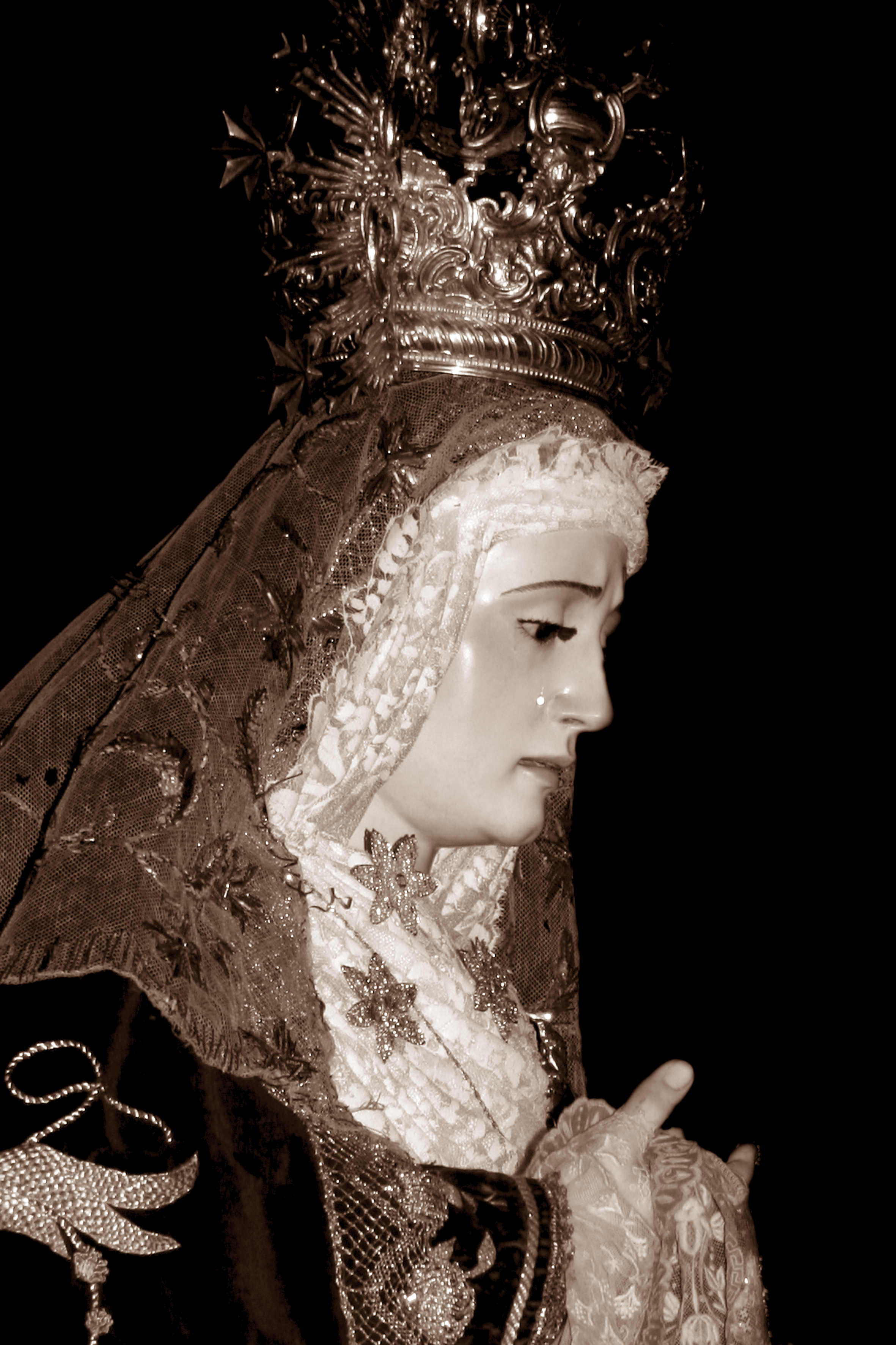 Nuestra Señora de los Dolores Gibraleón